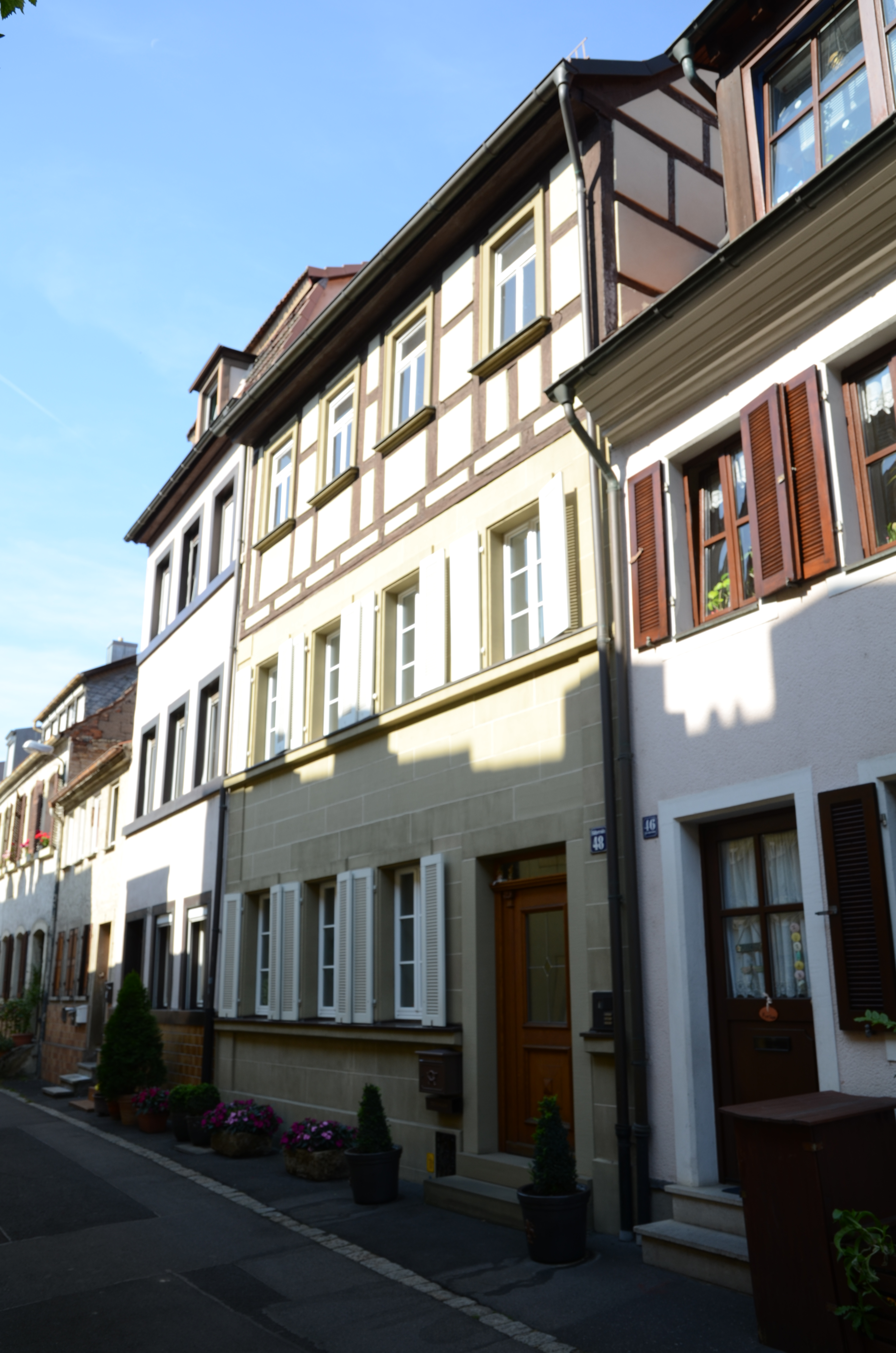 Schweinfurt Fischerrain 48